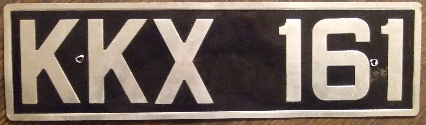 KENYA passenger c.1970's